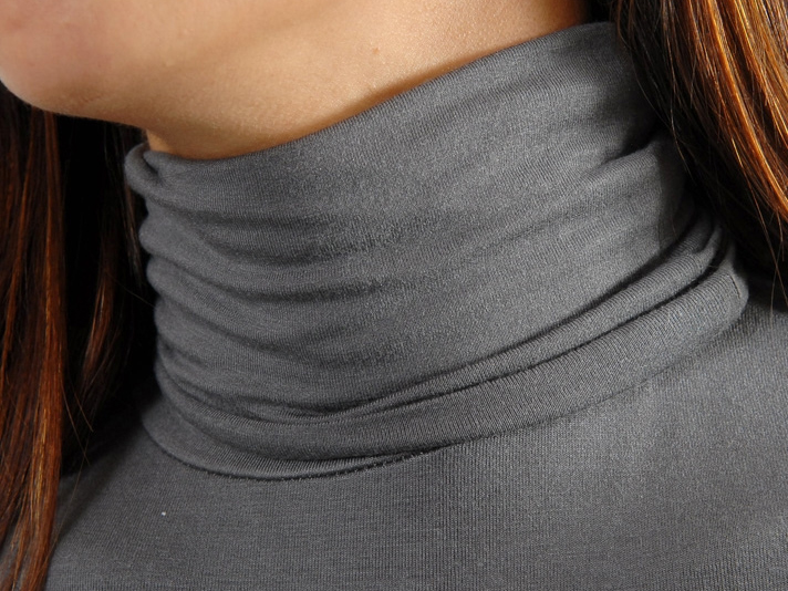 Sous-pull Zara avec haut col